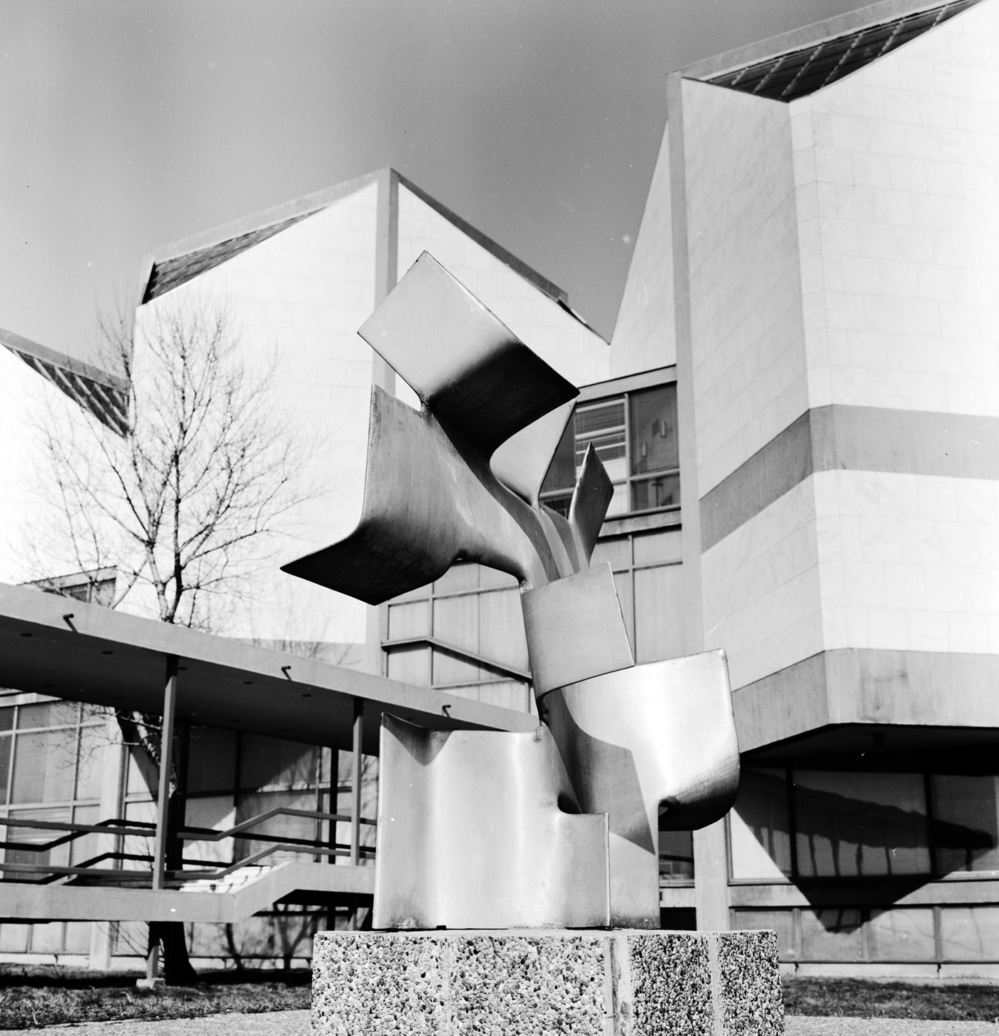 Српски (ћирилица): Зграда Музеја